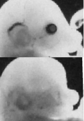 Maus - Pax6-Repression